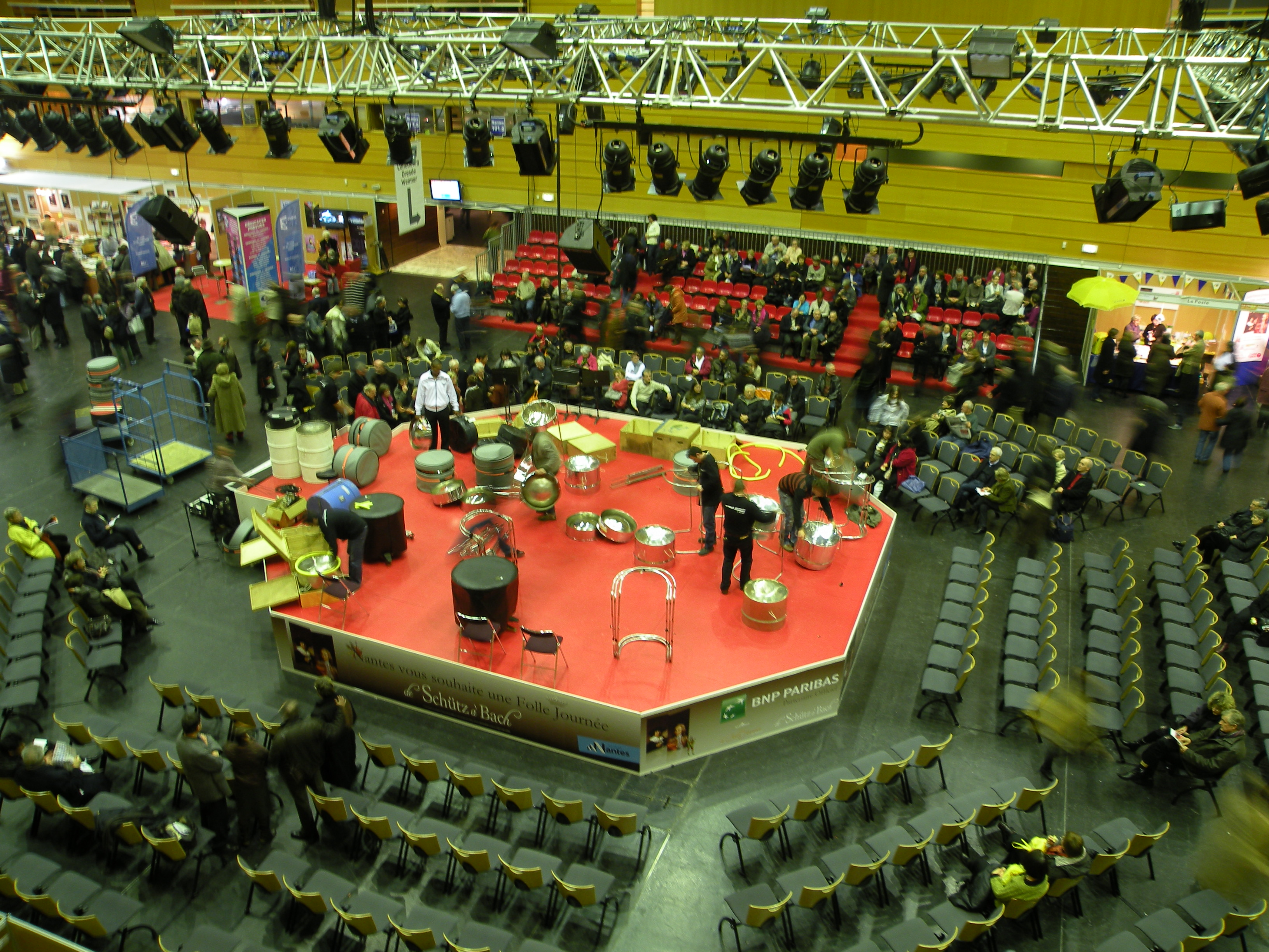 La Folle Journée de Nantes, 31 janvier 2009, kiosque de la Grande halle : changement de plateau entre le concert du Renegades steel band et celui de l'Orchestre de harpes de Saint-Herblain.